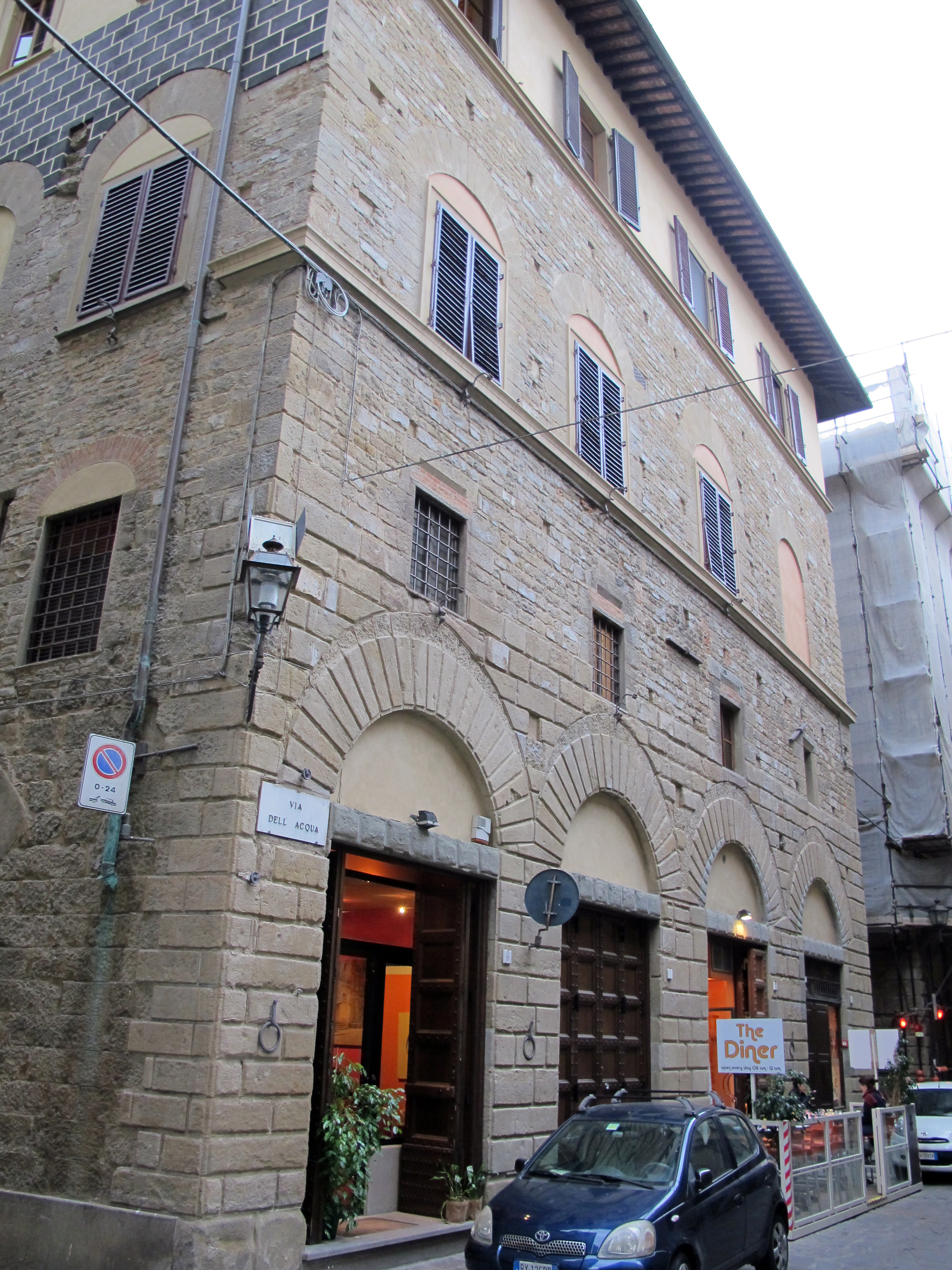 Via dell'acqua, palazzo covoni delle burella